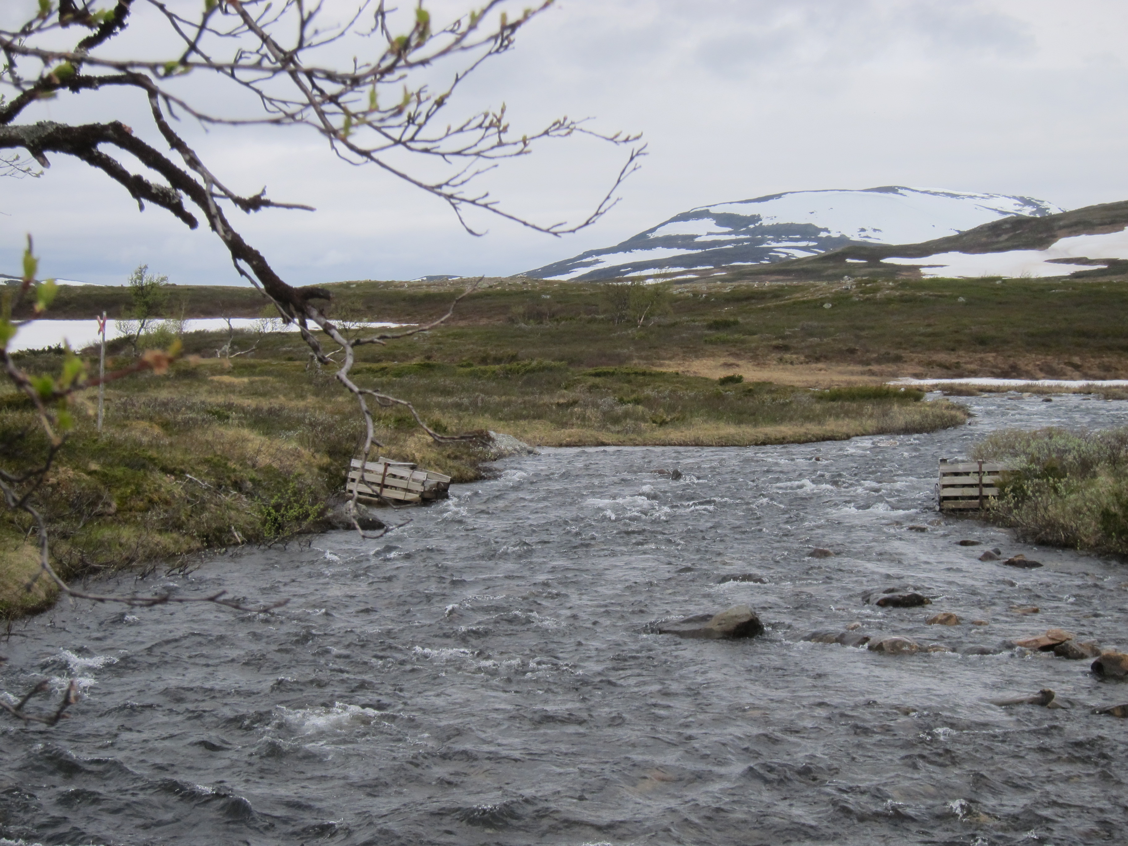 Vålån vid vinterleden mellan Vålåstugan och Helags fjällstation.